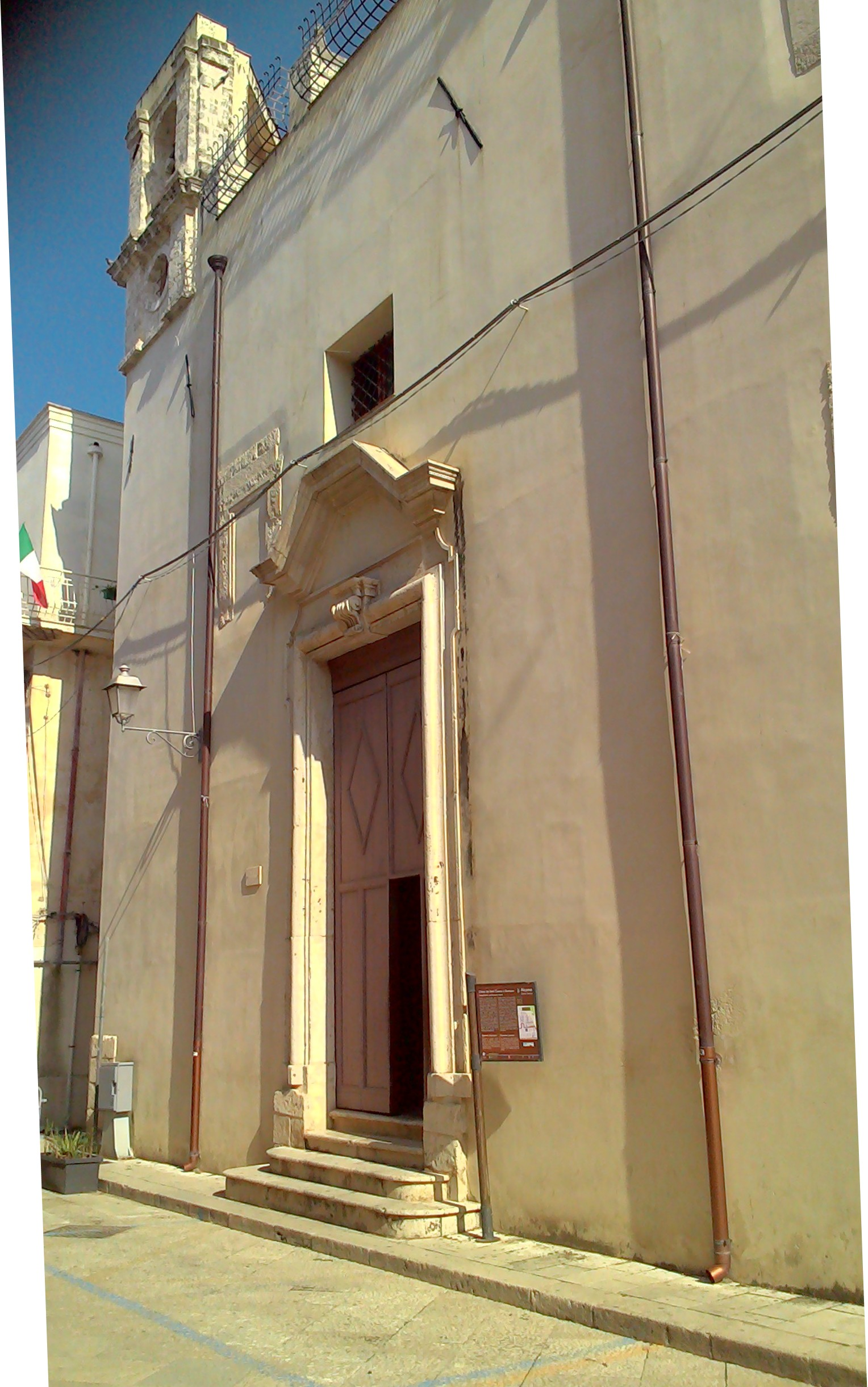 Facciata chiesa dei santi Cosma e Damiano